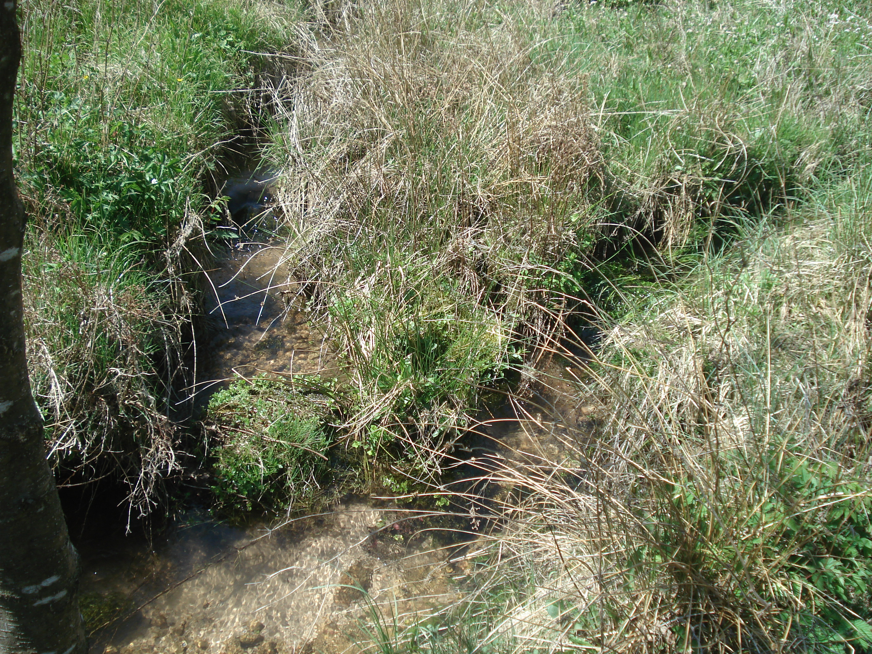 Zusammenfluss von Metzenbach (hinten links) und Weihersbach (hinten rechts) zum Heinrichsbach (vorne links)